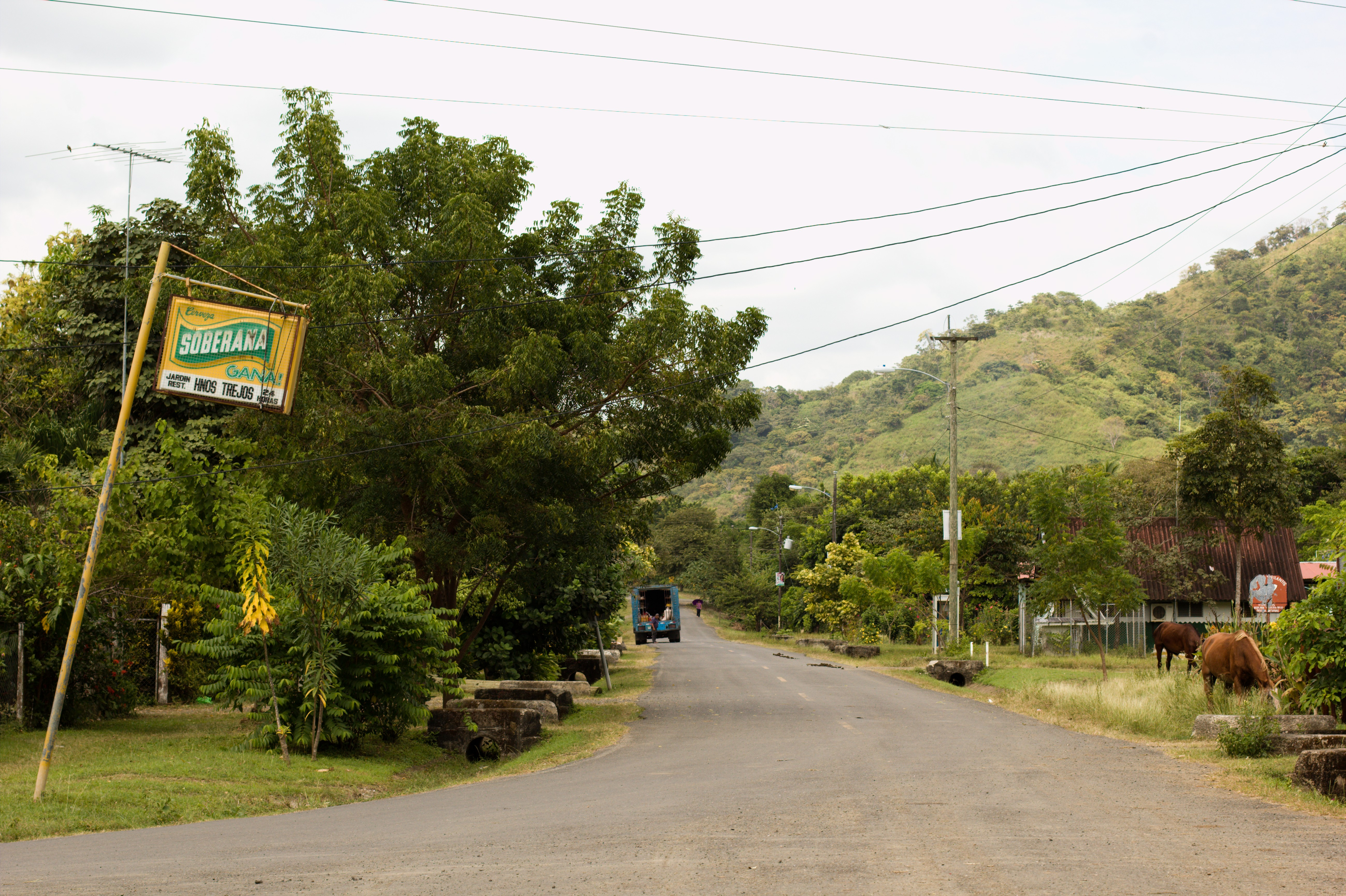 Pueblo de Cambutal, Provincia de los Santos, Panamá.